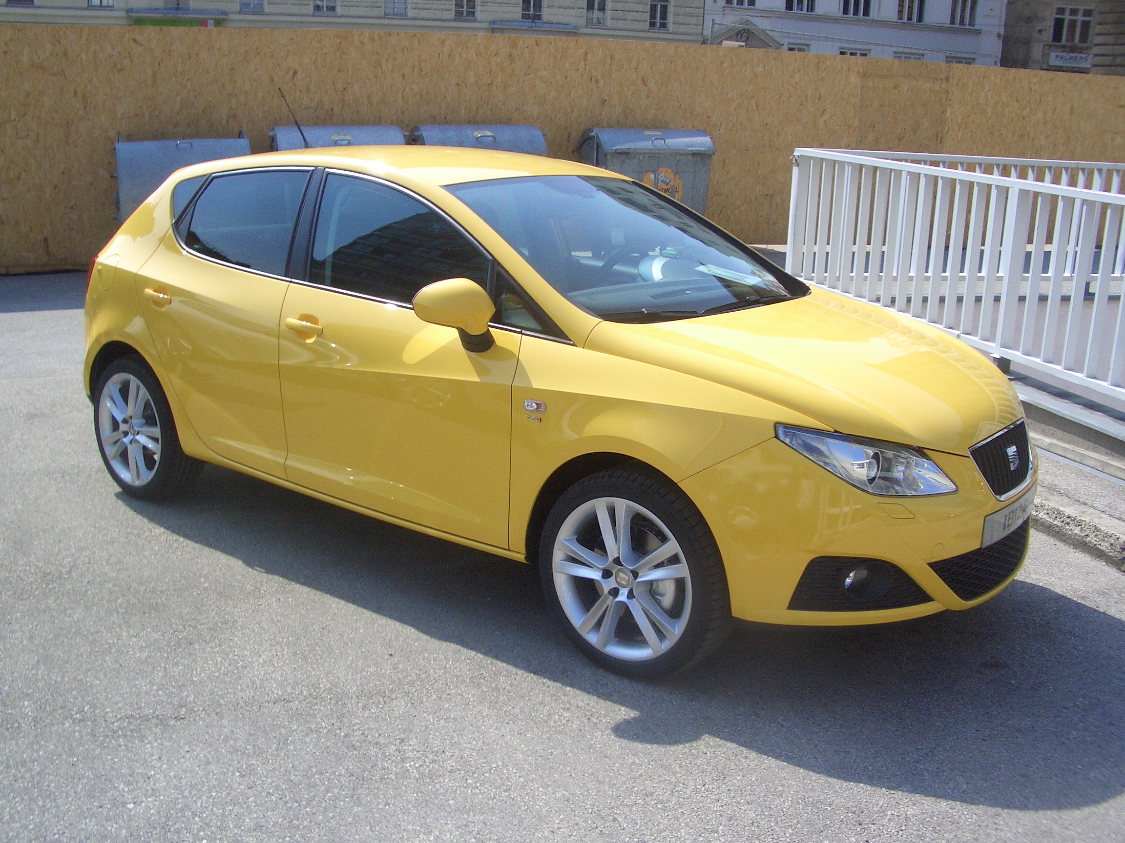 Seat Ibiza 6J BJ 2008